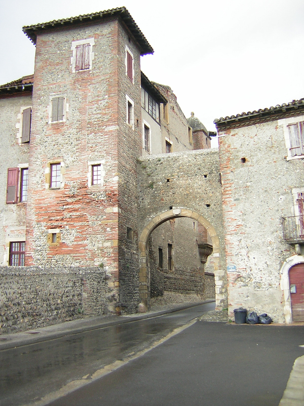 Palaminy (Haute-Garonne, France).